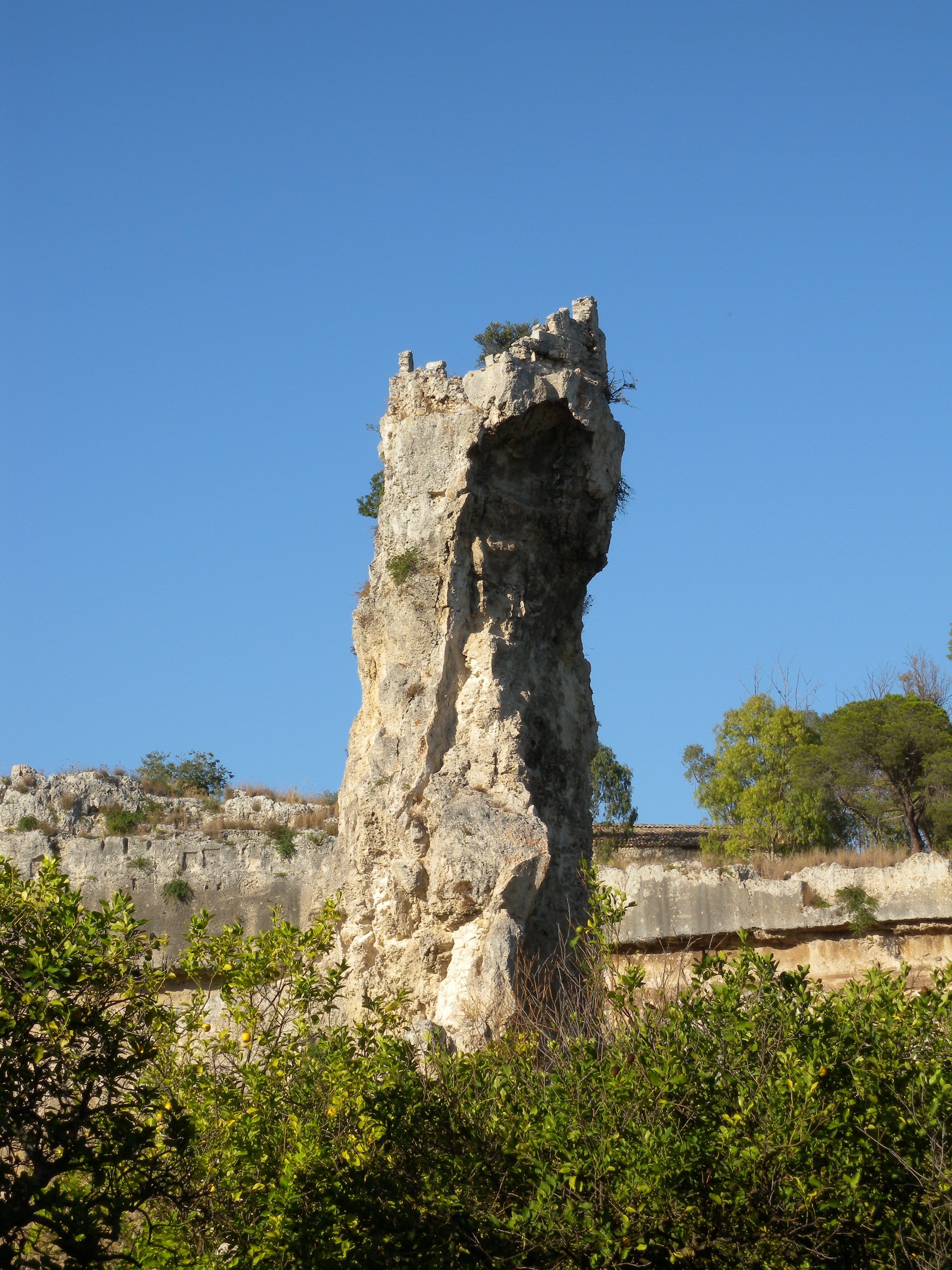 Latomia Neapolis - Siracusa (Sicilia)